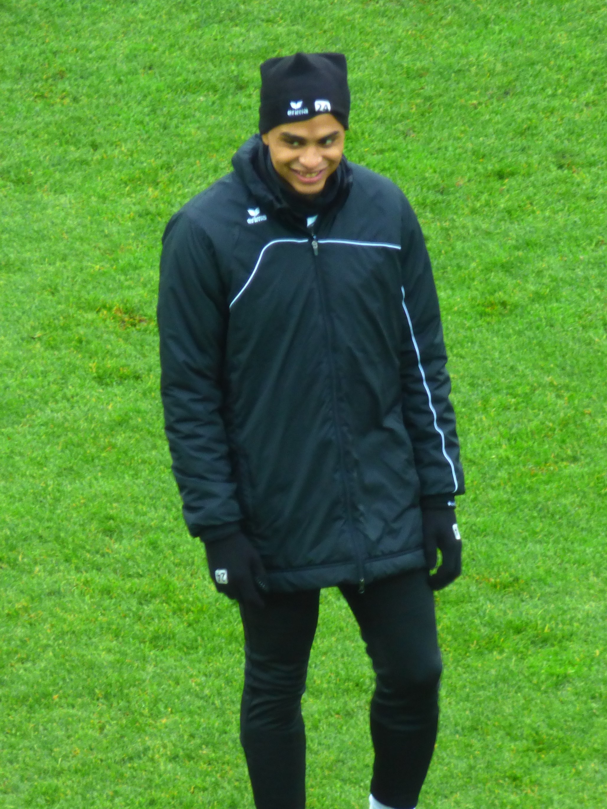 Yacine Bourhane avant le match Lens / Niort, le 21 décembre 2019, comptant pour la dix-neuvième journée du championnat de France de football de Ligue 2 2019-2020.